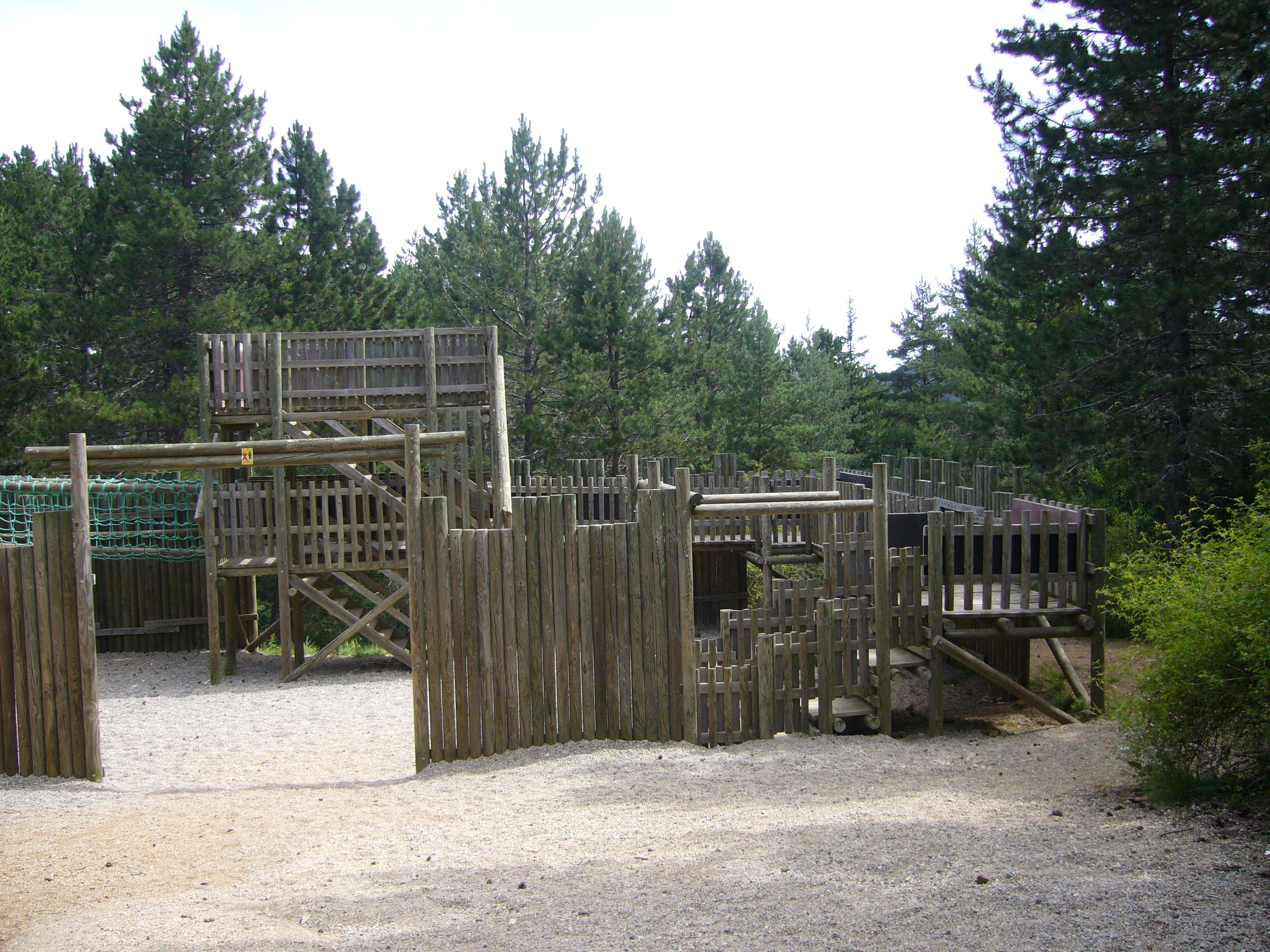 Le fort pour enfant sur le mont Mimat (Mende, Lozère, France)